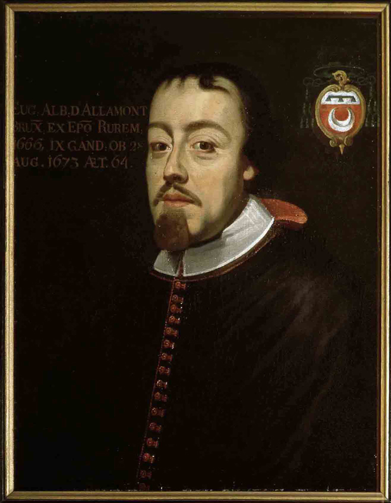 Sint-Baafskathedraal, Gent Portret van Mgr. Alb. d'Allamont; inv nr: 499/9